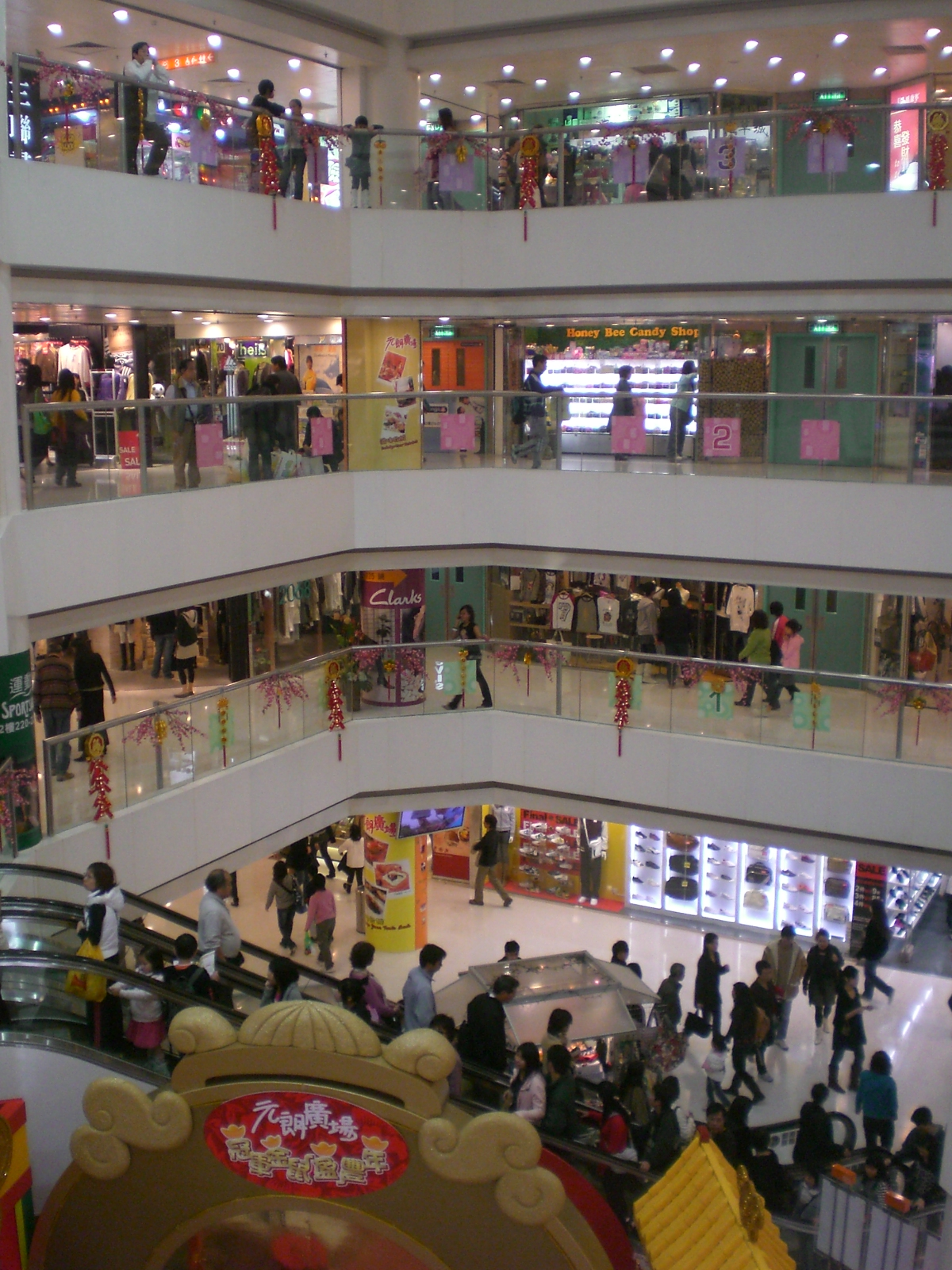 元朗區元朗新市鎮青山公路元朗段 元朗廣場